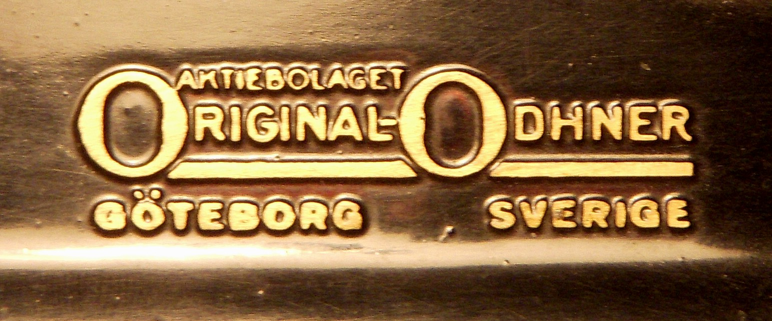 "Original Odhner" räkenkalkylator från 1935, firmaskylt